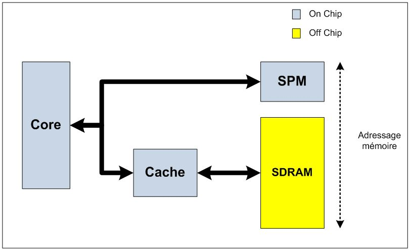 Schéma des mémoires SPM et cache embarquées dans un microprocesseur.